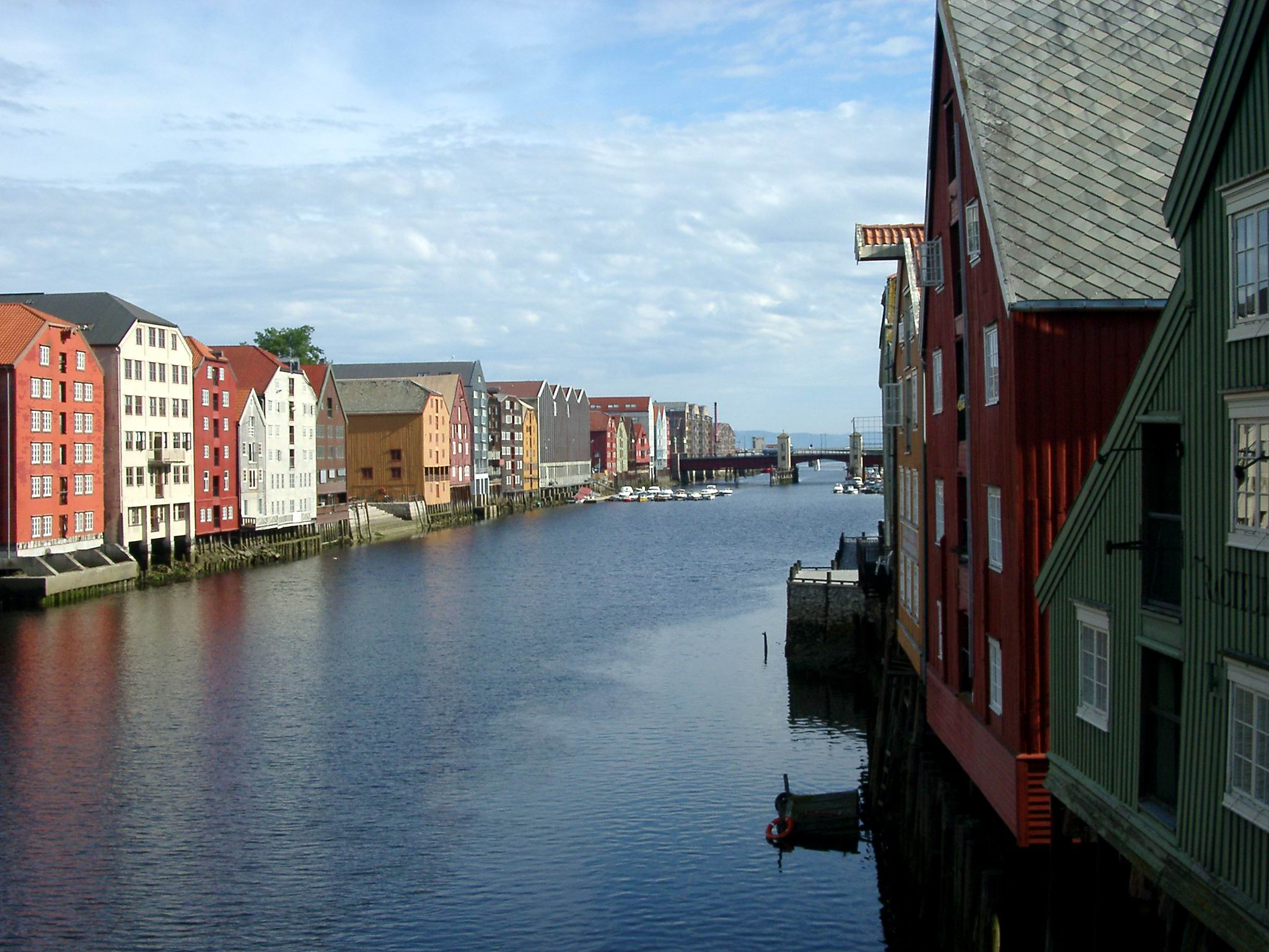 Trondheim Norwegen